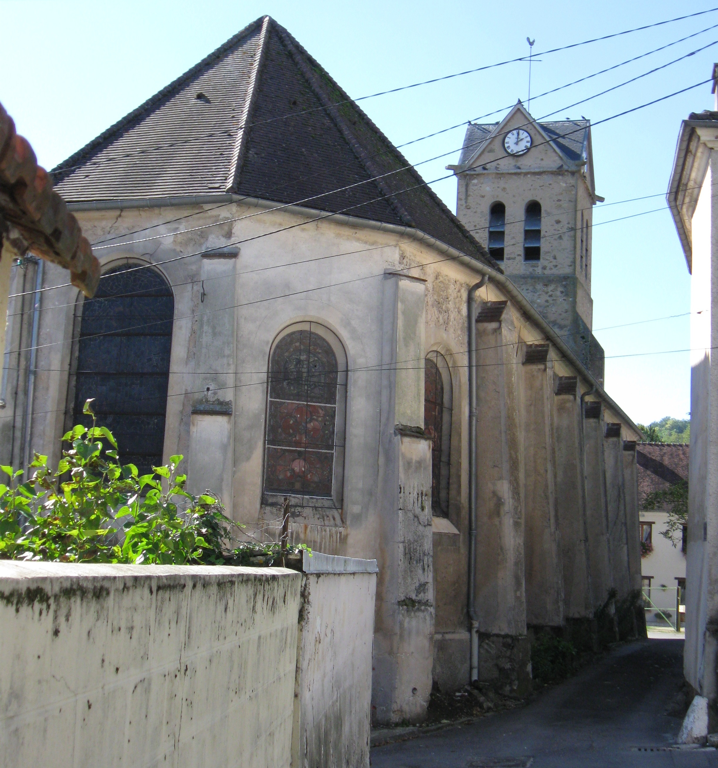 Église catholique Sainte-Marguerite-d'Antioche de Nanteuil-sur-Marne. (département de Seine-et-Marne, région Île-de-France).